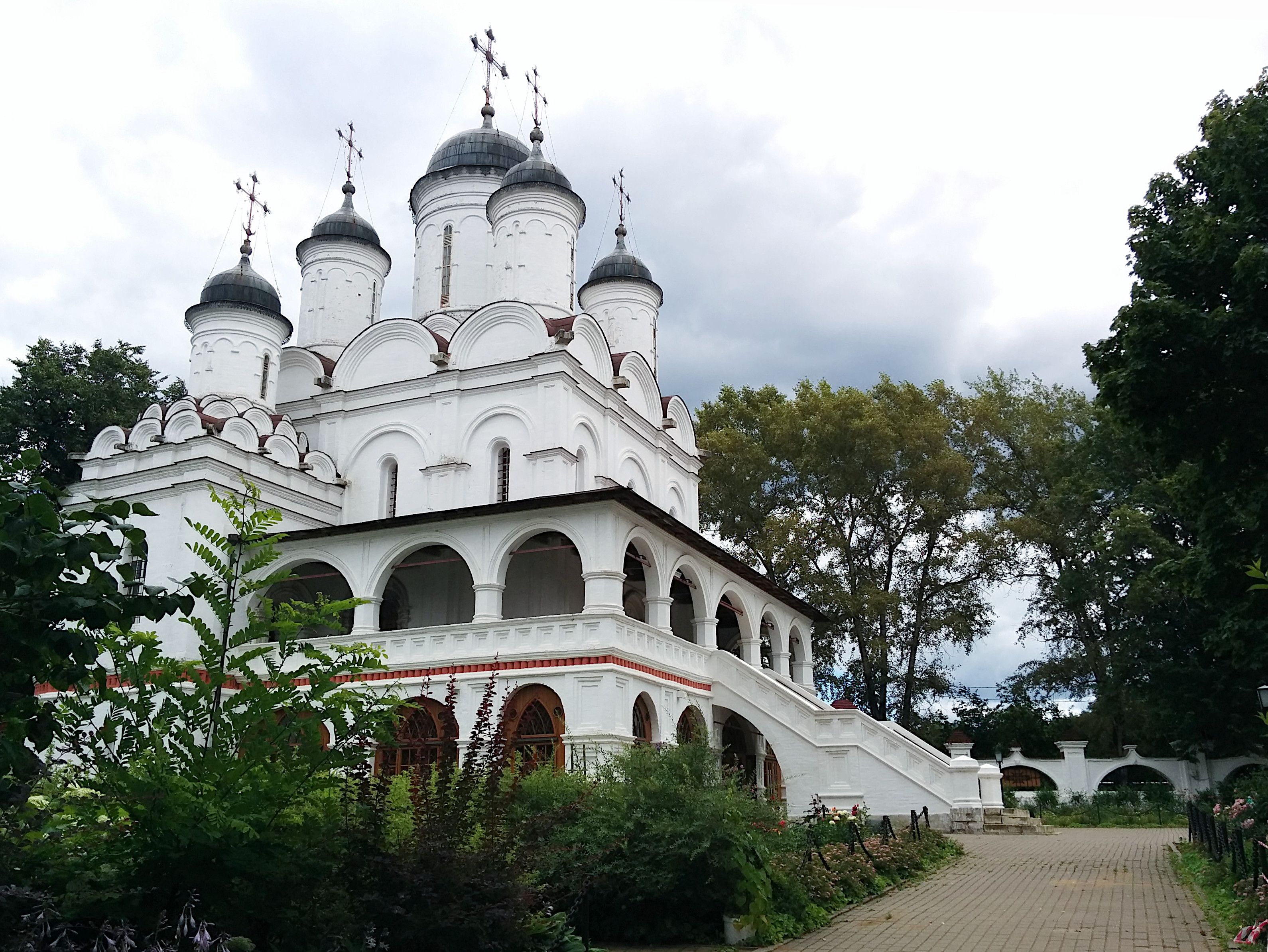 Церковь Преображения в усадьбе Вязёмы, Одинцовский район, Московская область